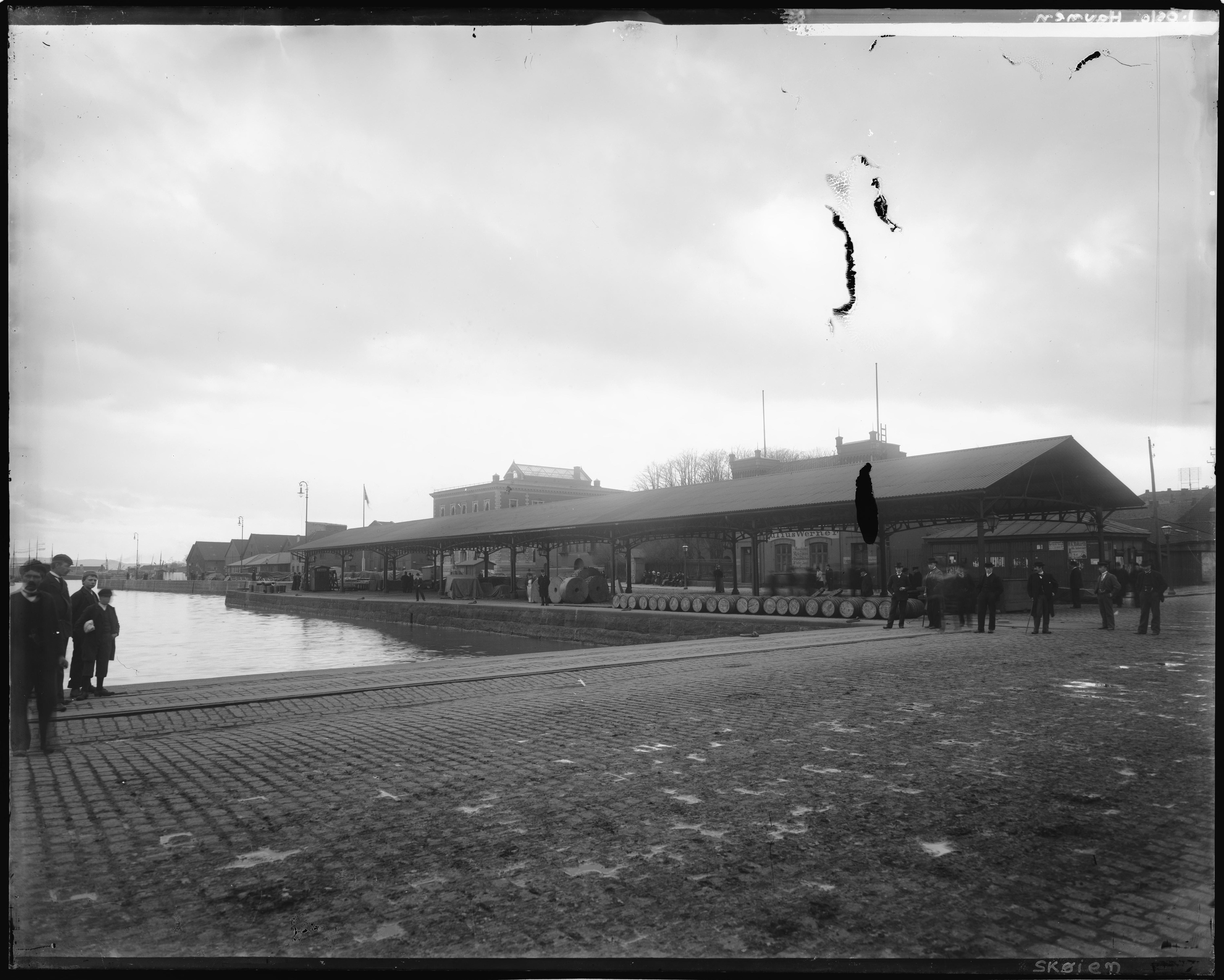 Påskrift negativ: 1. Oslo. Havnen [Riksantikvaren] Påskrift konvolutt: B-1 Oslo havn. Palibryggen. [Riksantikvaren] Sted: Oslo havn,Palébryggen Kommune: Oslo Fylke: Oslo Tagger: hovedstad by brygge havn